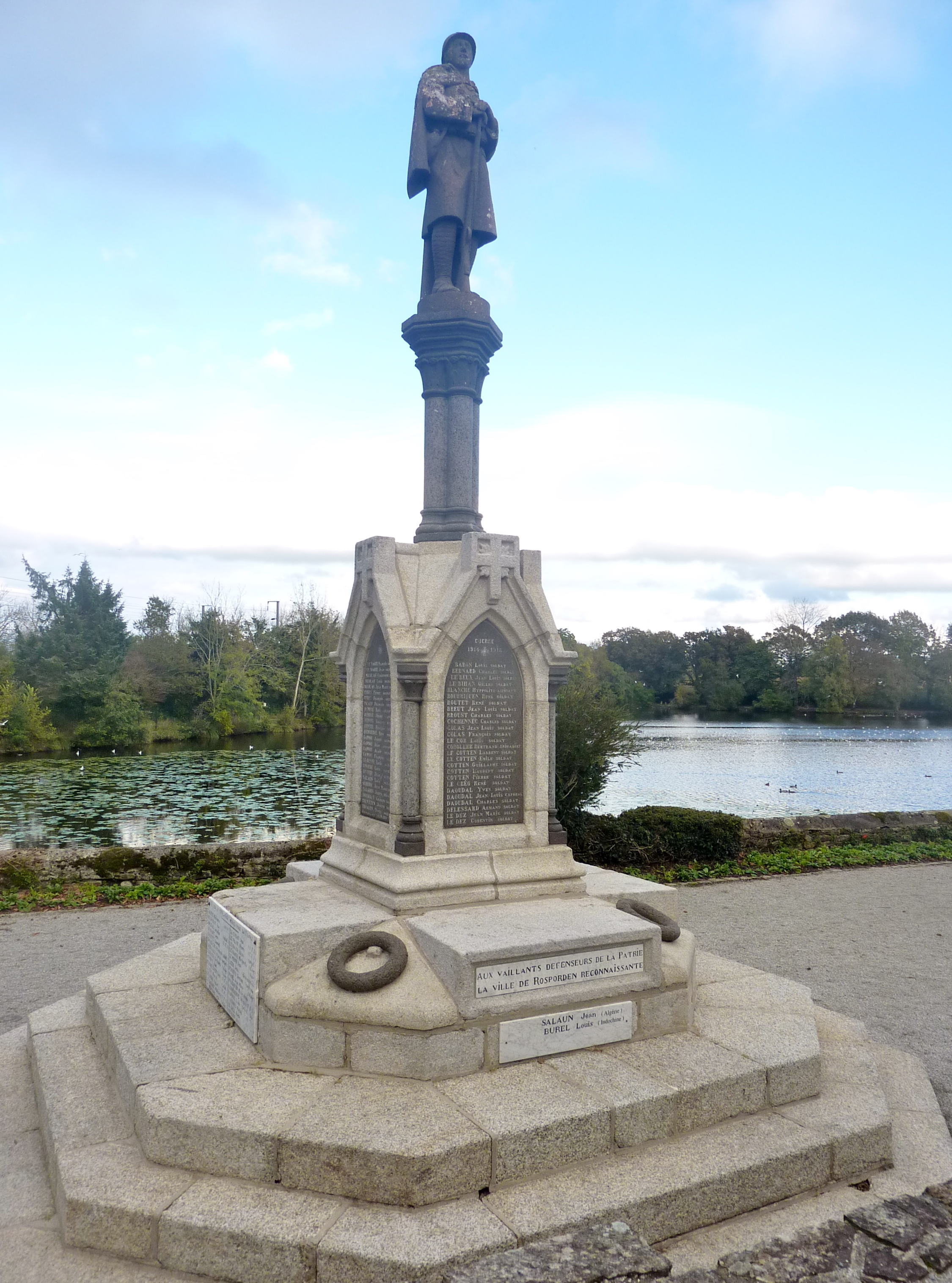 Le monument aux morts de Rosporden, conçu par l'architecte Charles Chaussepied et construit en kersantite ; la sculpture est due à Armel Beaufils